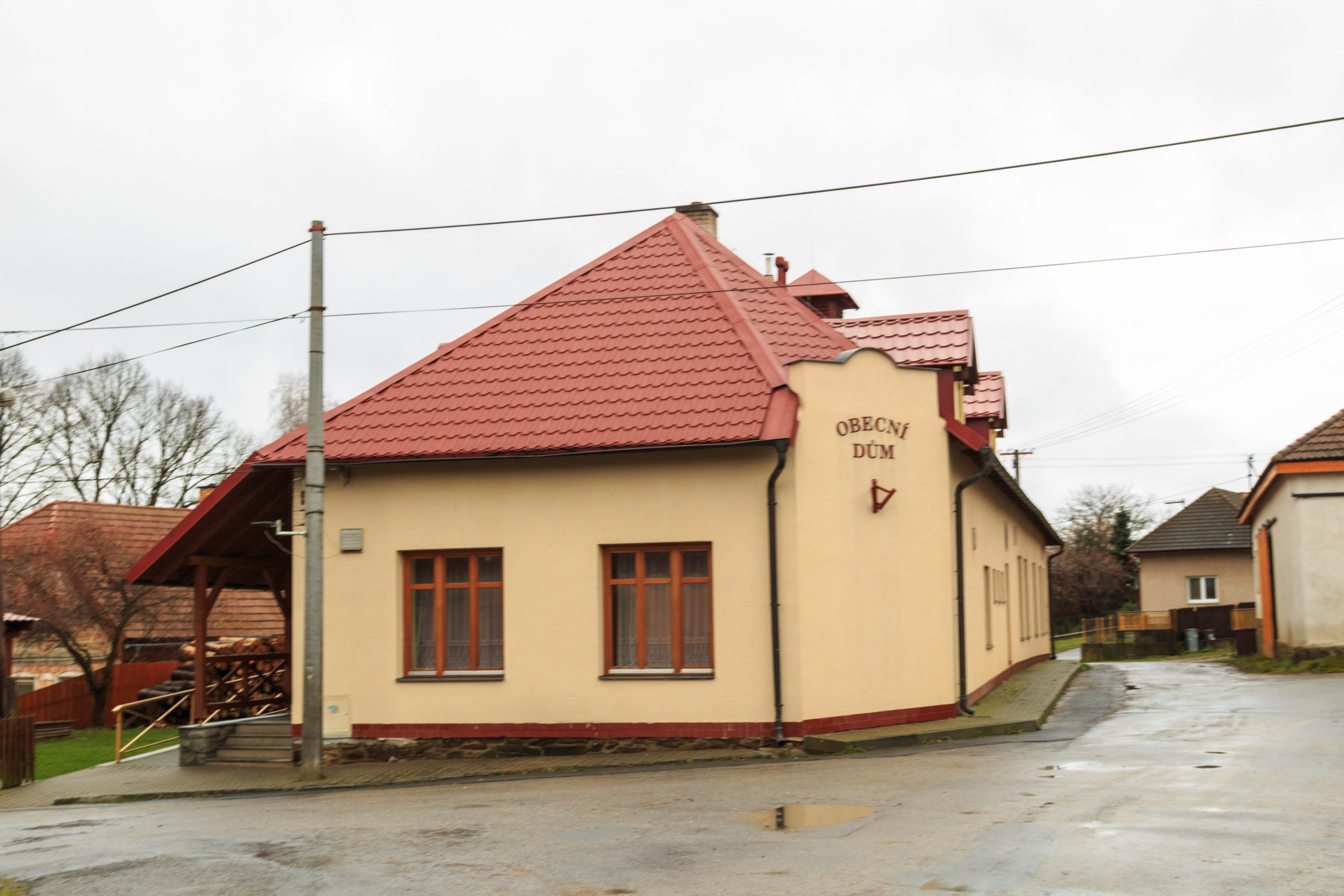 Malčín obecní dům